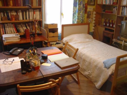 La chambre de l'abbé Pierre à la Halte Emmaüs d'Esteville (Seine-Maritime, France).